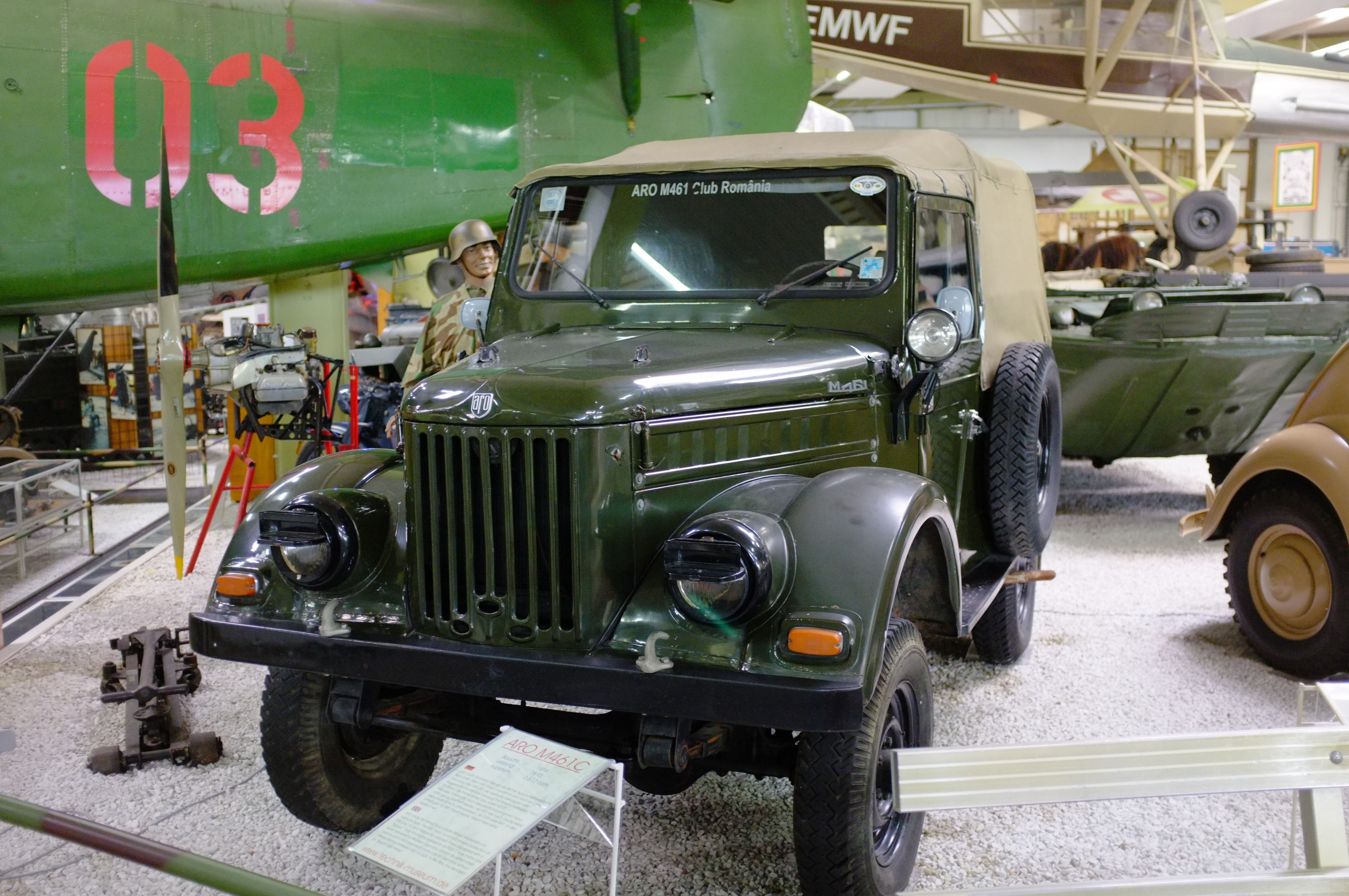 Auto- und Technikmuseum Sinsheim